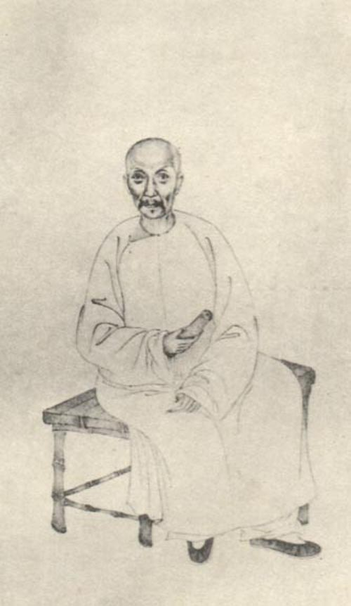 清代学者。